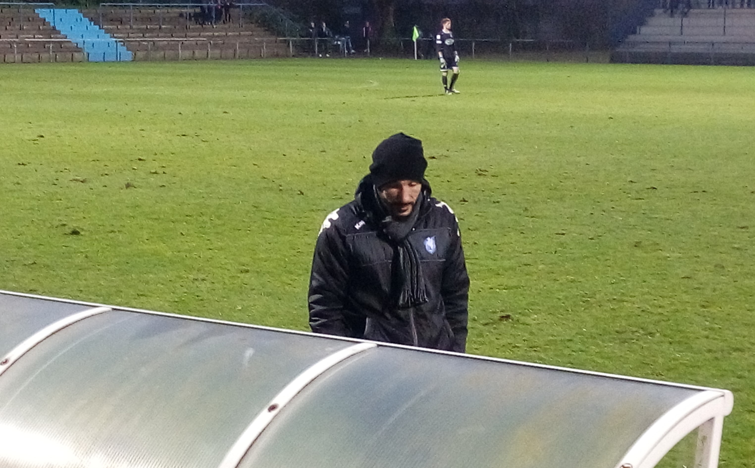 Malik Hebbar lors du match Lens B / Drancy, comptant pour la vingt-et-unième journée du championnat de France amateur de football, le 4 mars 2017, au Stade François-Blin d'Avion.